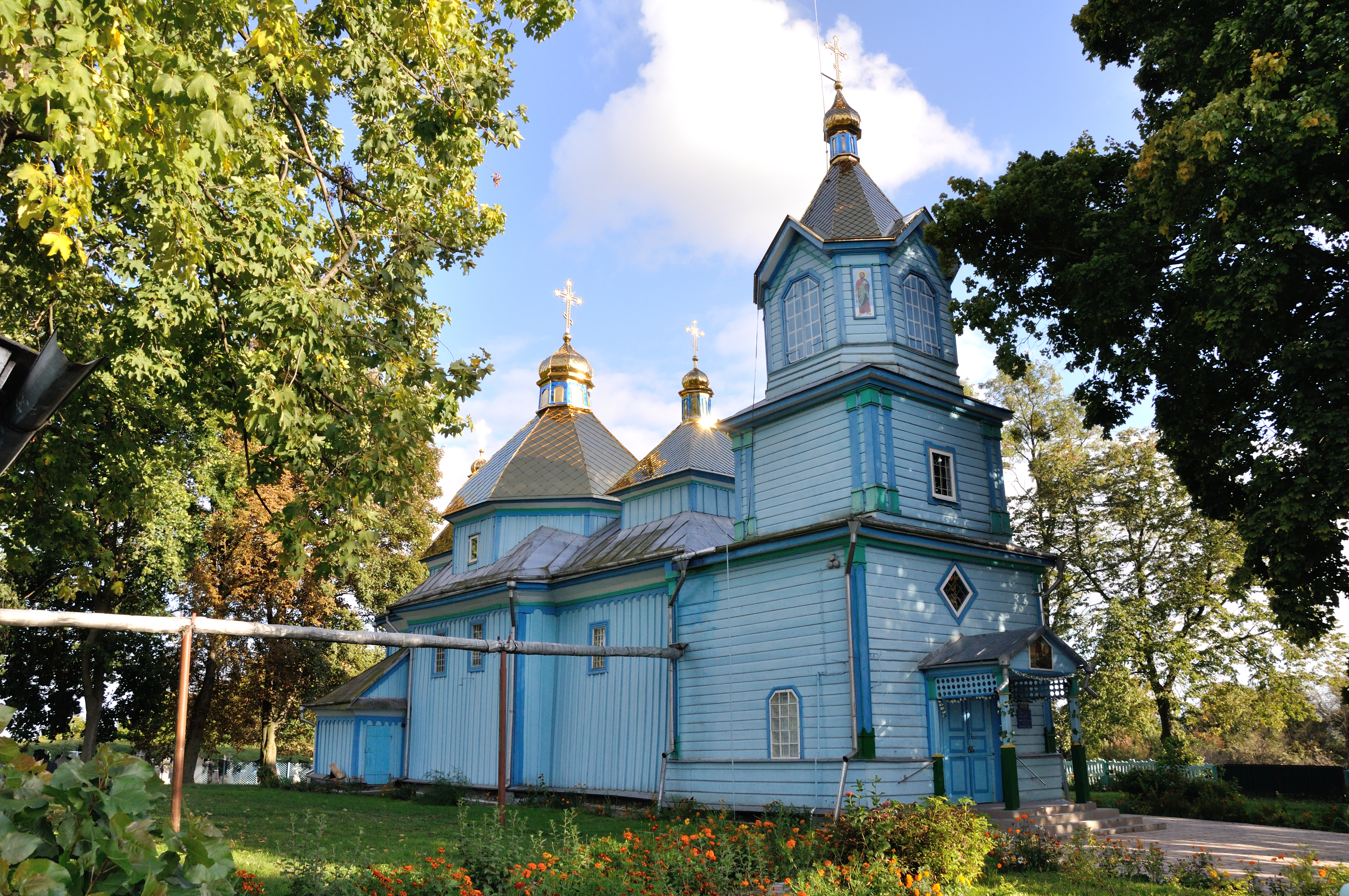 Церква Св.Юрія (дер.), с.Грабів